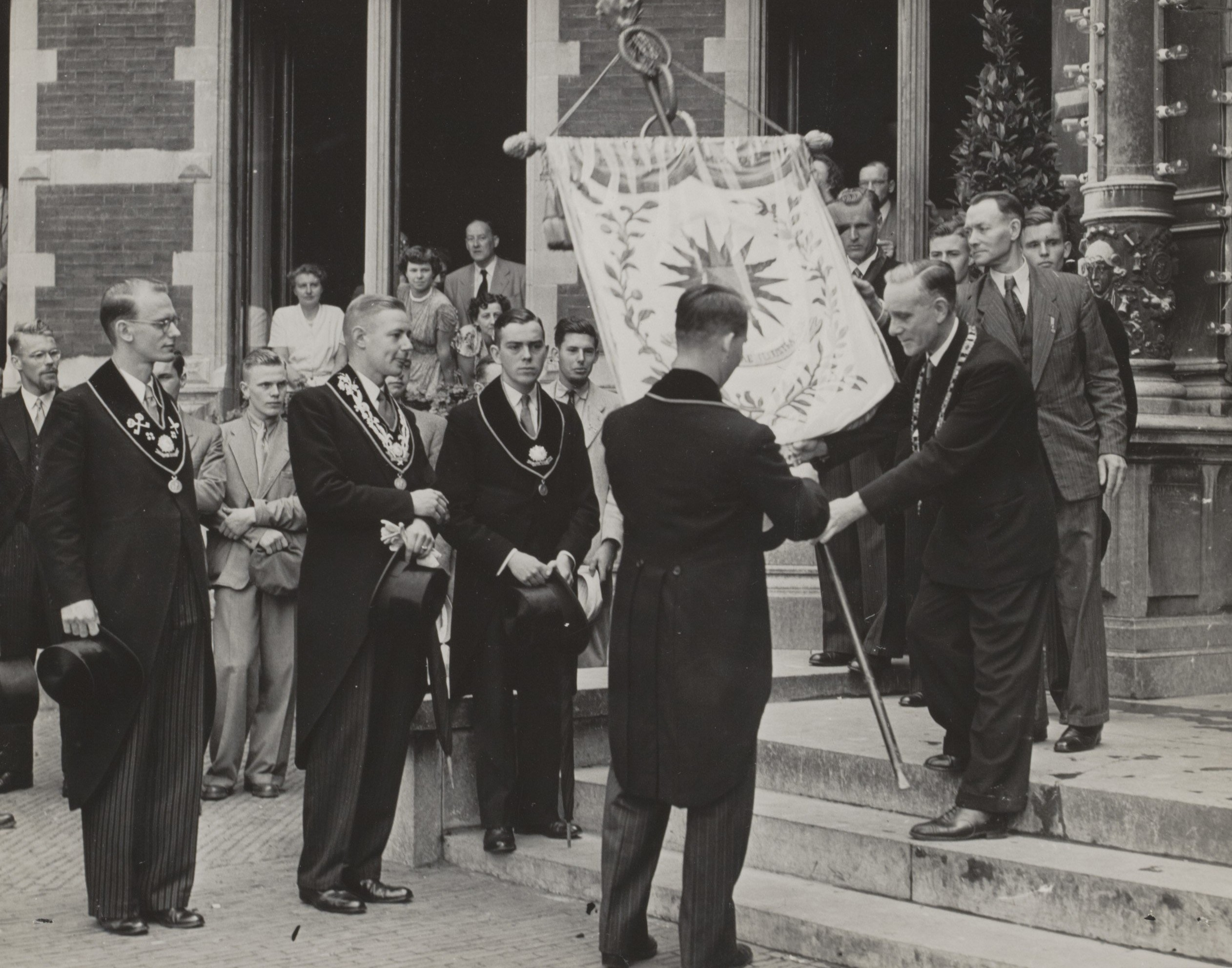 Collectie / Archief : Fotocollectie Elsevier Reportage / Serie : [ onbekend ] Beschrijving : 63ste Lustrum van het USC. De aanbieding van de Universiteitsbanier door de rector-magnificus prof. dr. J.H.W. Verzijl aan de Senaat van het USC voor het gebouw van de Universiteit Datum : 2 juli 1951 Locatie : Utrecht (stad) Trefwoorden : jubilea, studentenverenigingen, vaandels Persoonsnaam : Verzijl, J.H.W. Fotograaf : Fotograaf Onbekend / Anefo Auteursrechthebbende : Nationaal Archief Materiaalsoort : Foto (zwart/wit) Nummer archiefinventaris : bekijk toegang 2.24.05.02 Bestanddeelnummer : 056-0978